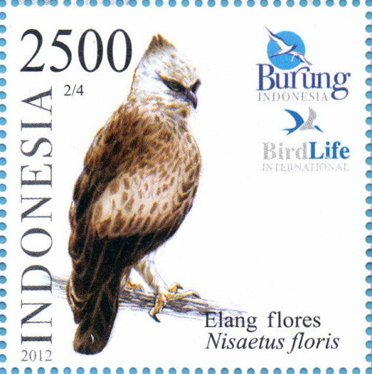 Nisaetus floris